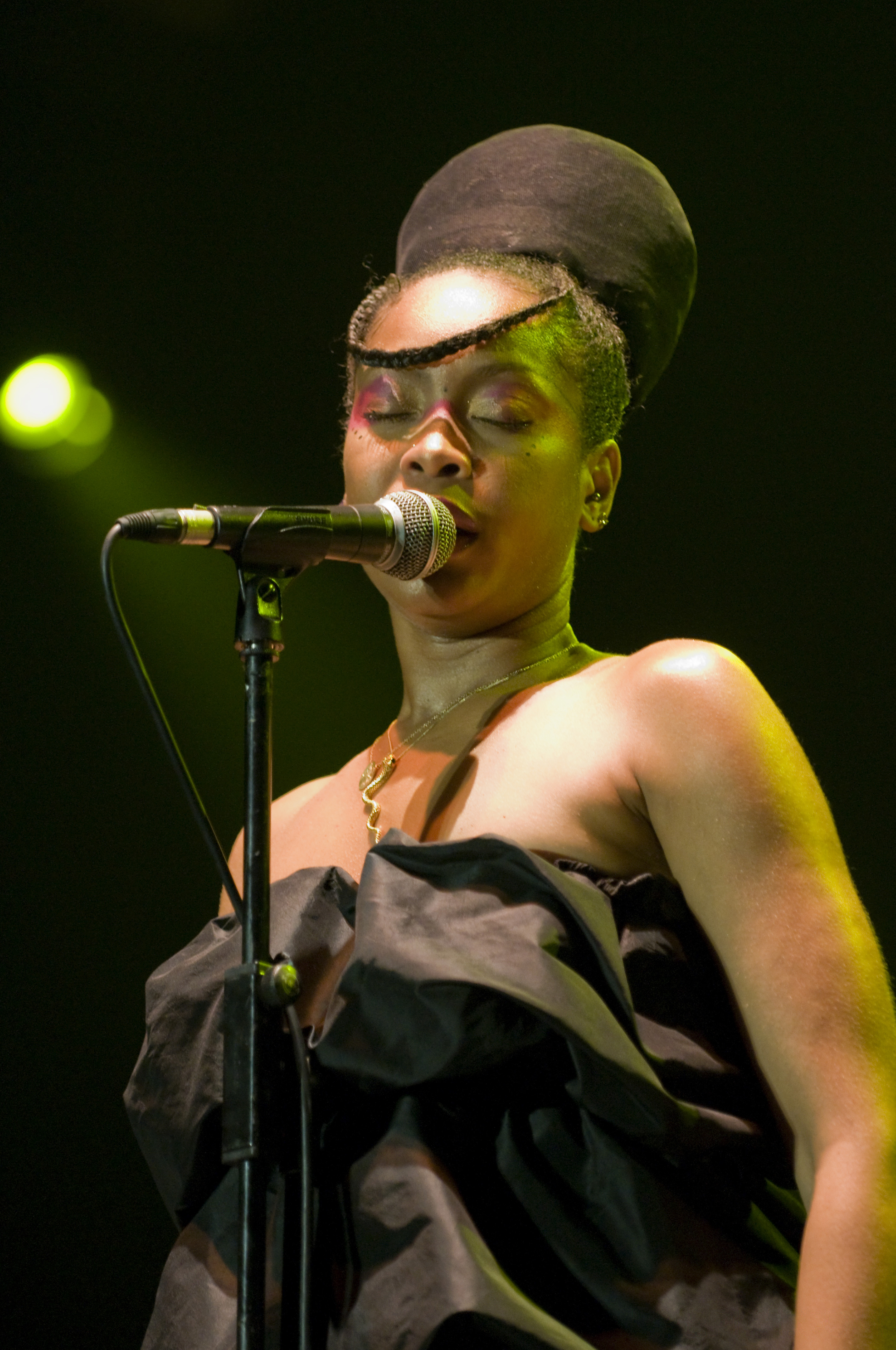 Erykah Badu